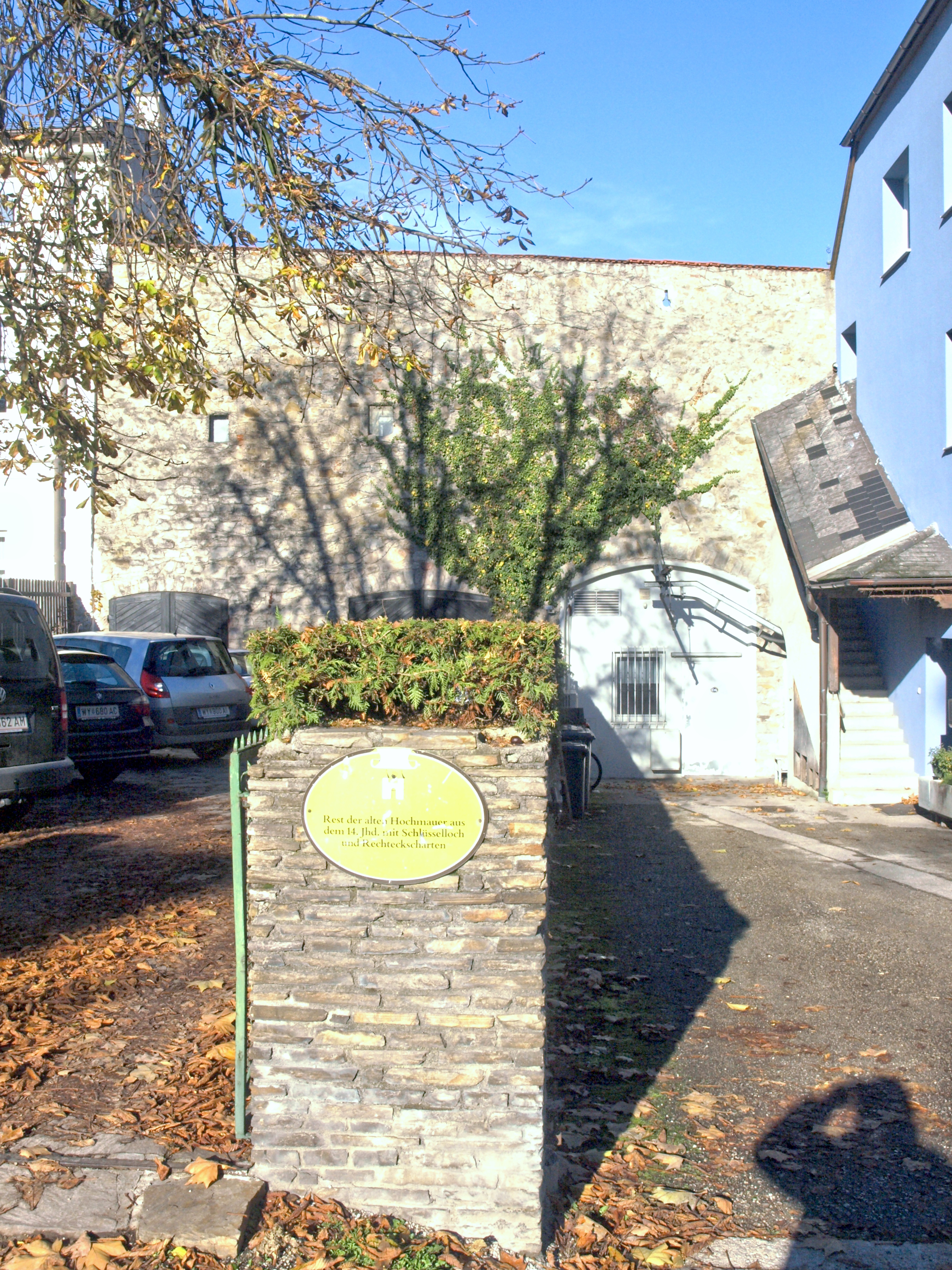 Stadtmauerabschnitt